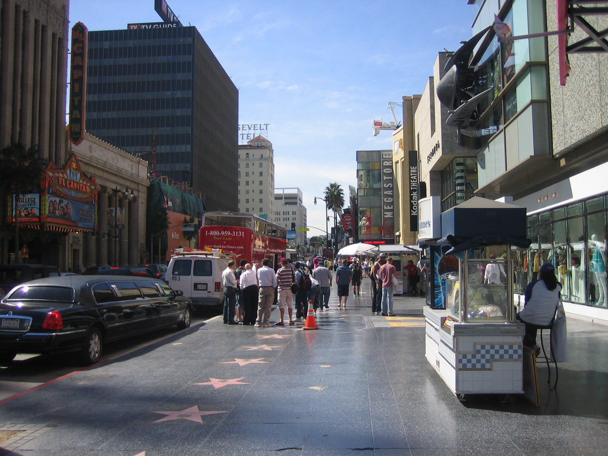 hollywood blvd